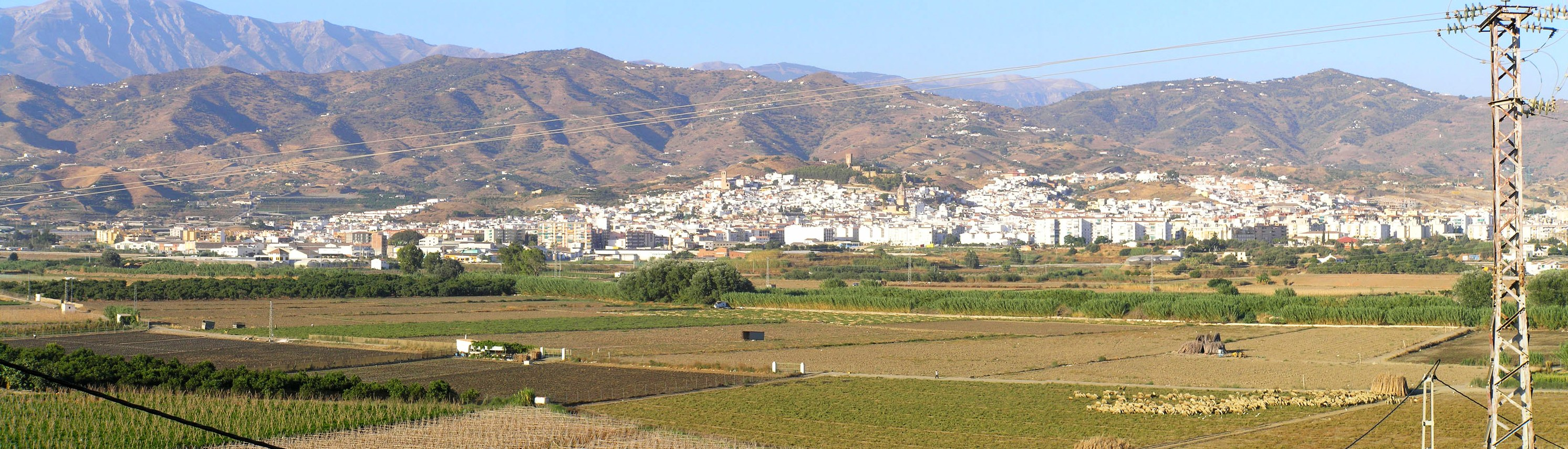 Vista Panorámica del centro histórico de Vélez-Málaga desde la vega del río Vélez, en Málaga (España)